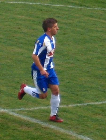 Alex durante un partido oficial.